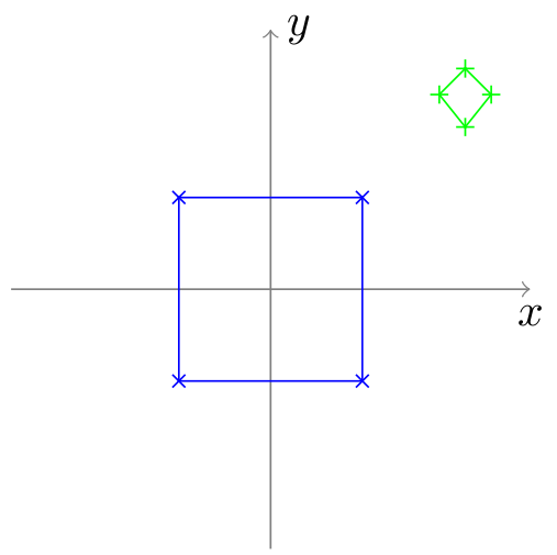 Illustration de la méthode de base de l'analyse procustéenne : positionnement du problème